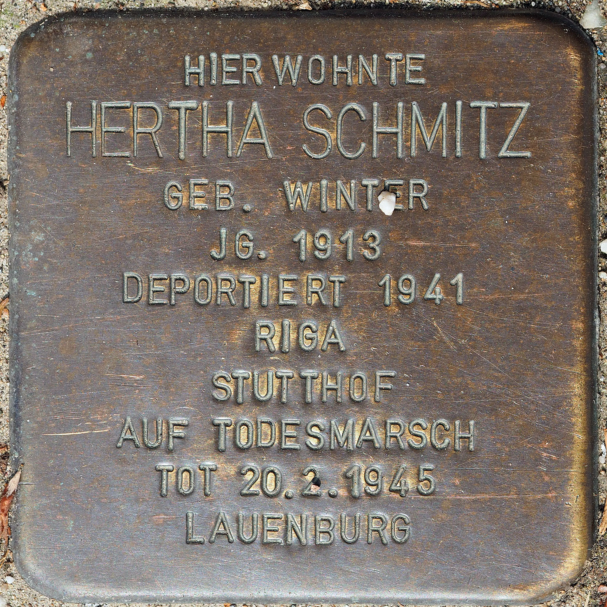 Stolpersteine GV: Schmitz, Hertha